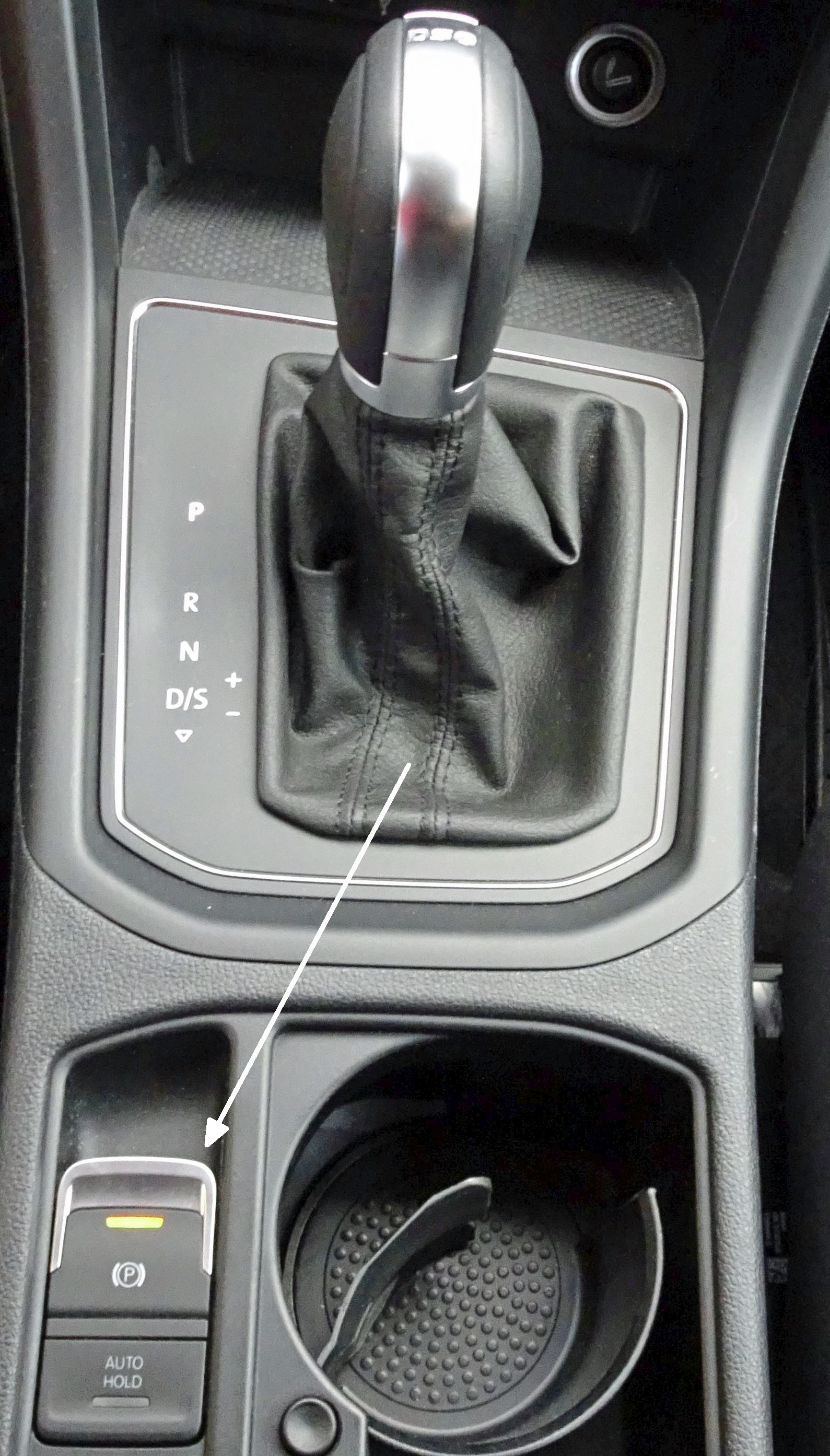 Elektrische Feststellbremse in der Mittelkonsole eines Touran 1.4l TSI Comfortl., Erstzulassung: 4/2016